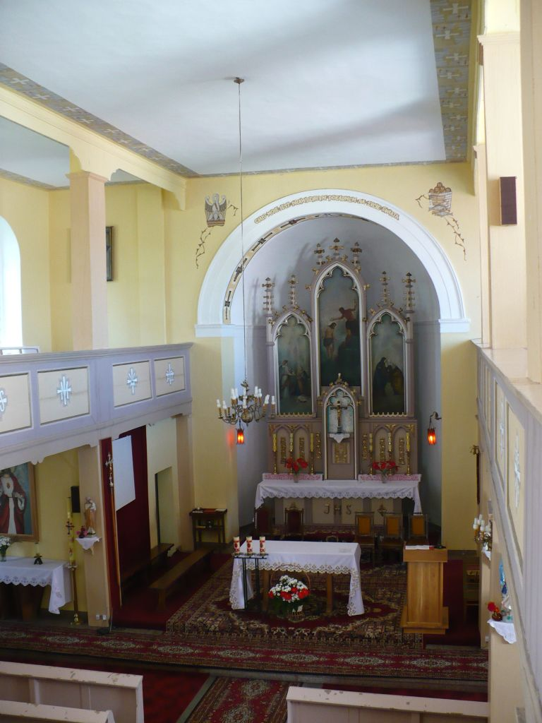 Wnetrze kościoła w Lubrzy, widok na ołtarz